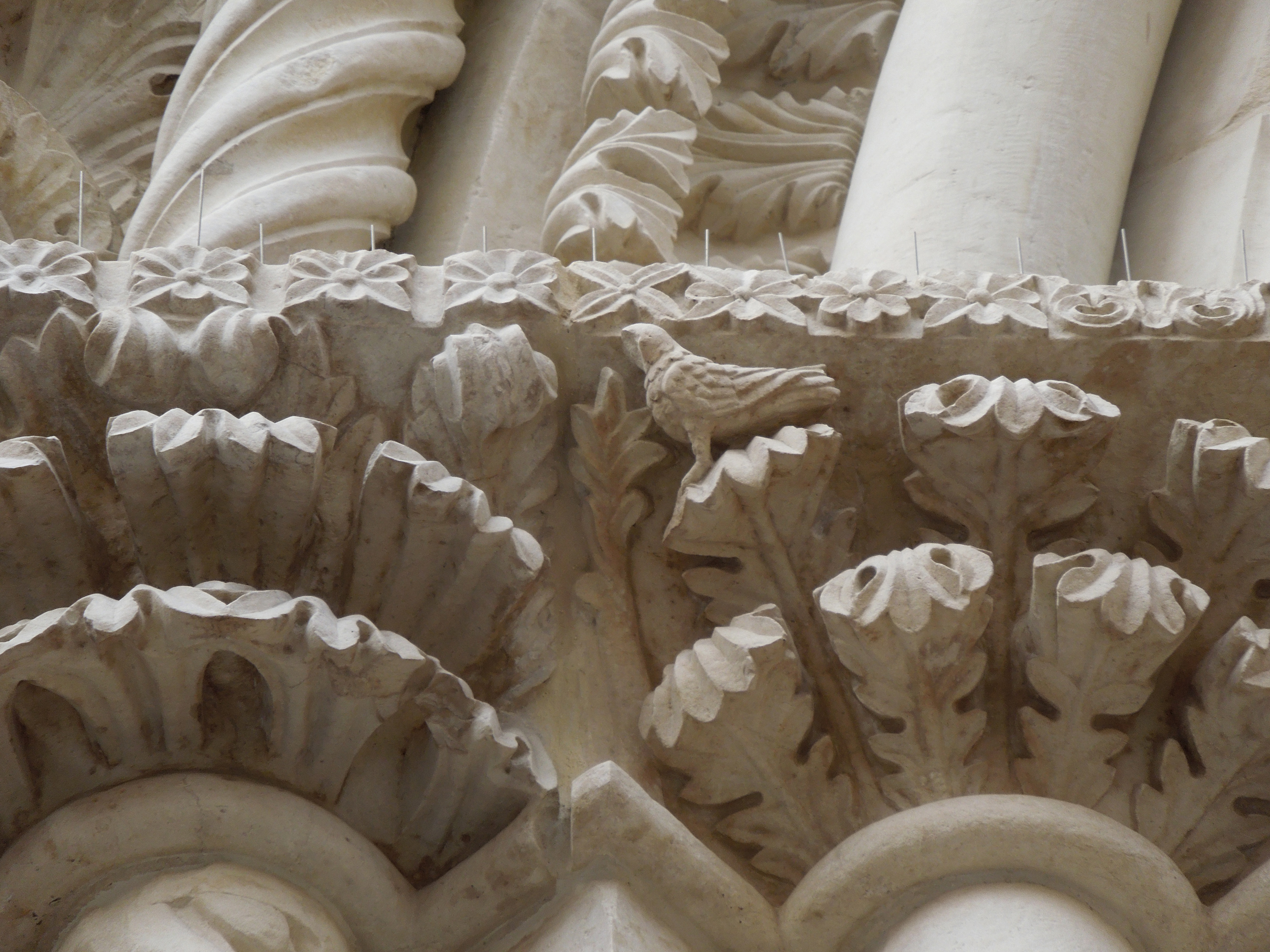 Particolare dell'uccellino scolpito in mezzo alle foglie dei capitelli di sinistra del portale della chiesa di Sant'Antonio di Teramo, in Abruzzo.